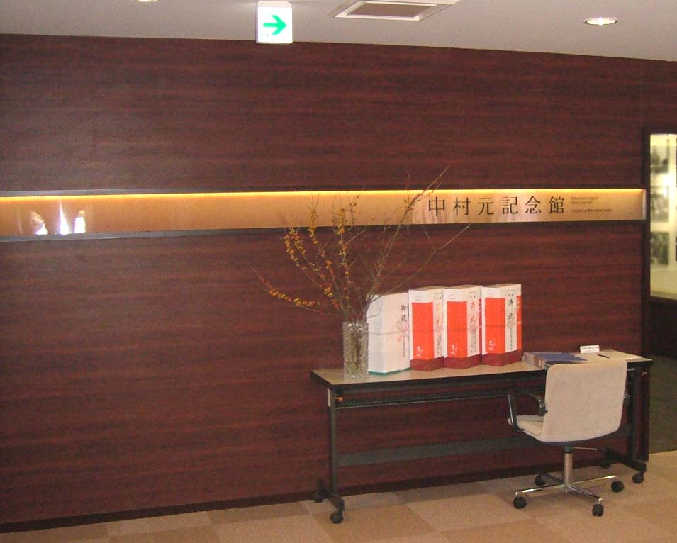 中村元記念館